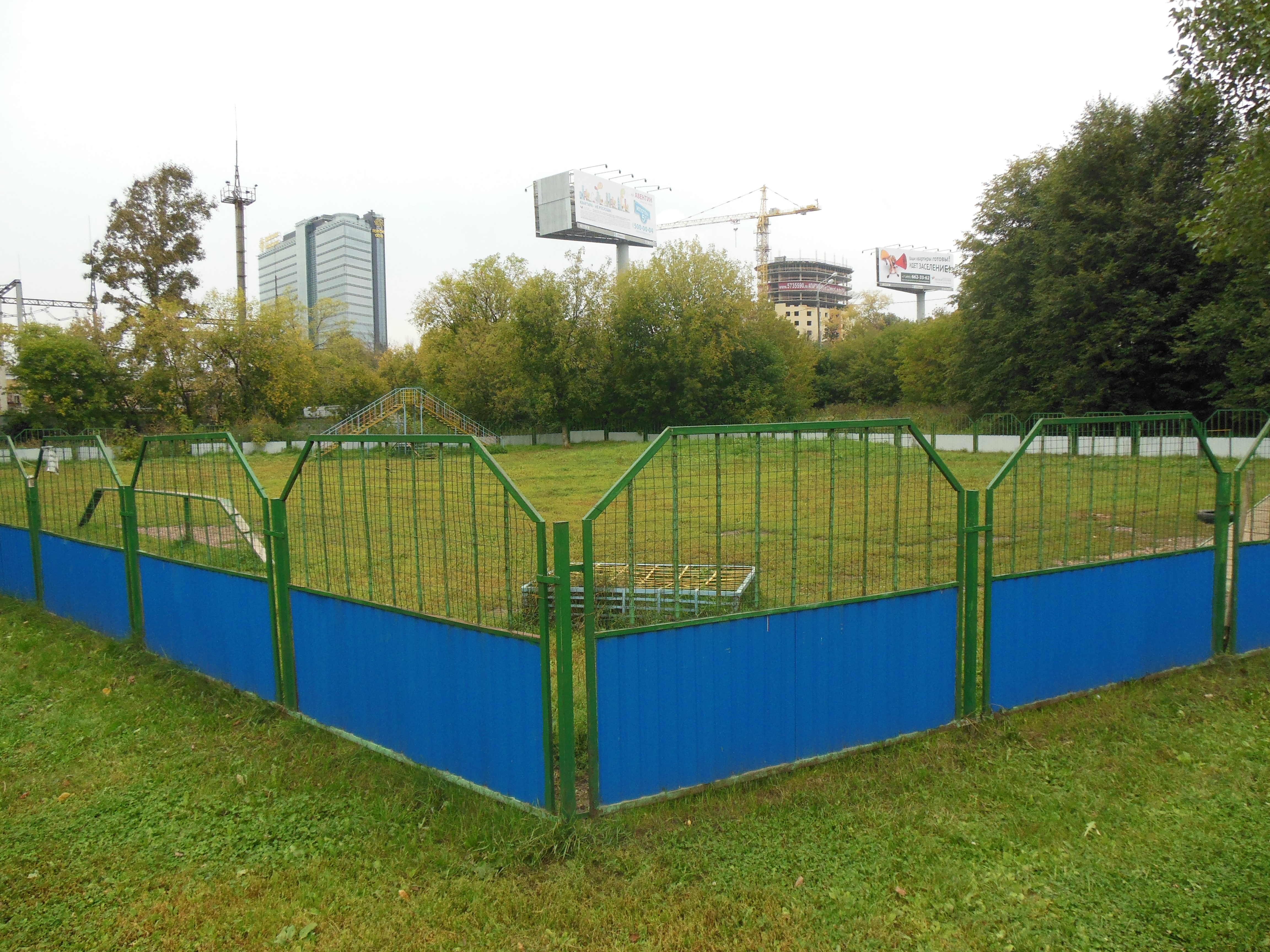 Собачья площадка в сквере